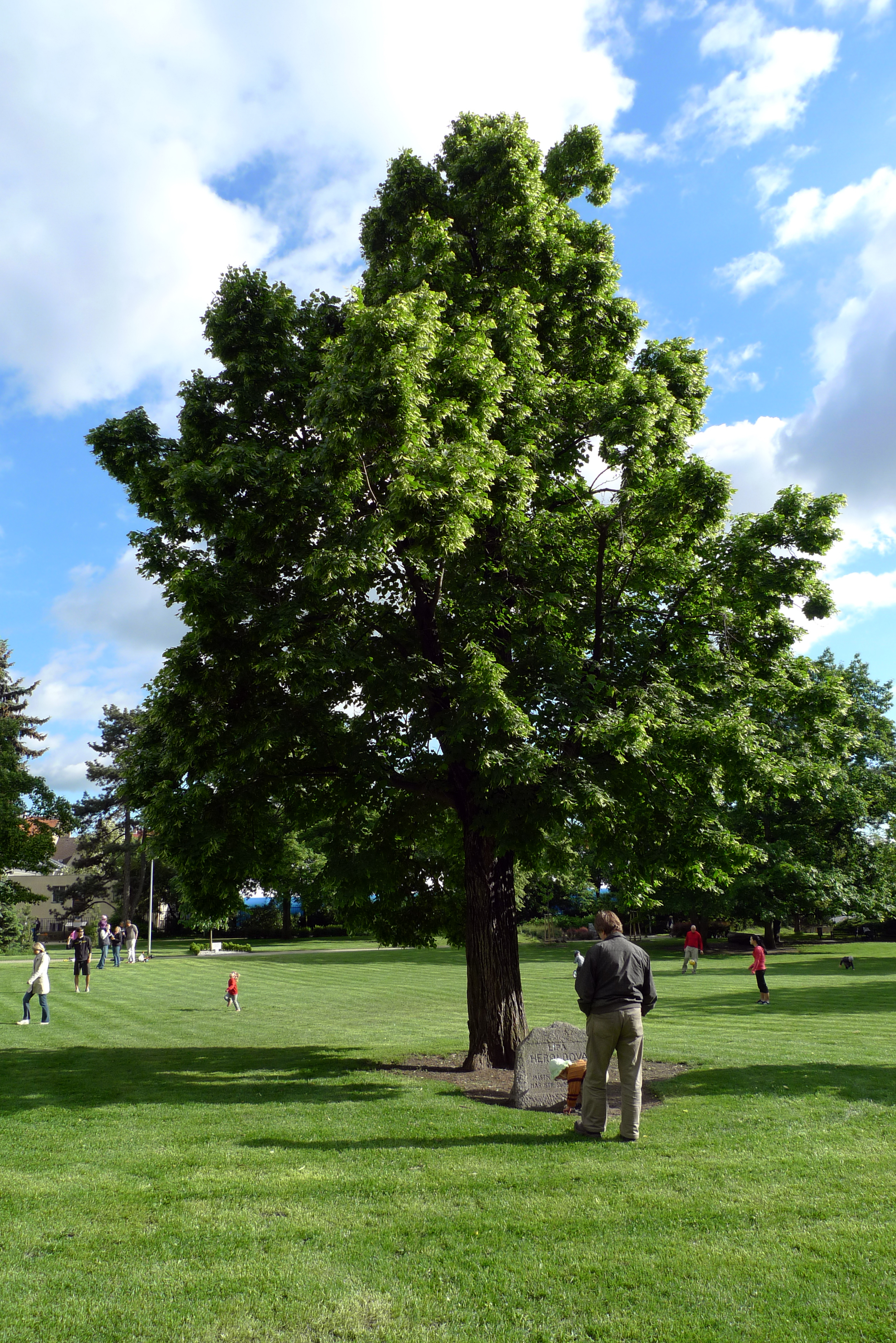 Heroldovy sady v Praze 10-Vršovicích - Heroldova lípa.